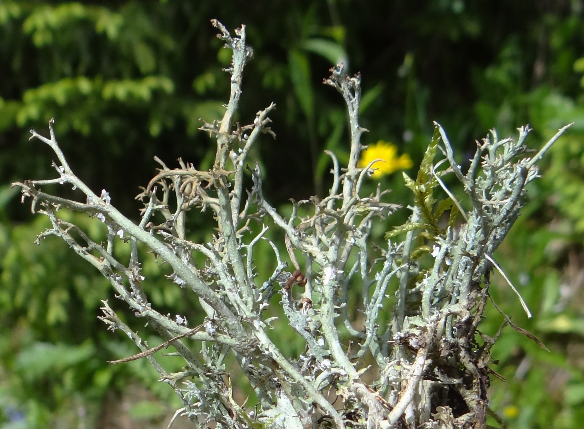 Cladonia furcata (habitat:West Tatra Mountains, Dolina Miętusia)